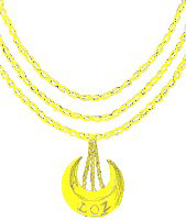 Collier de l'Ordre du Croissant avec comme inscription 'LOZ'.